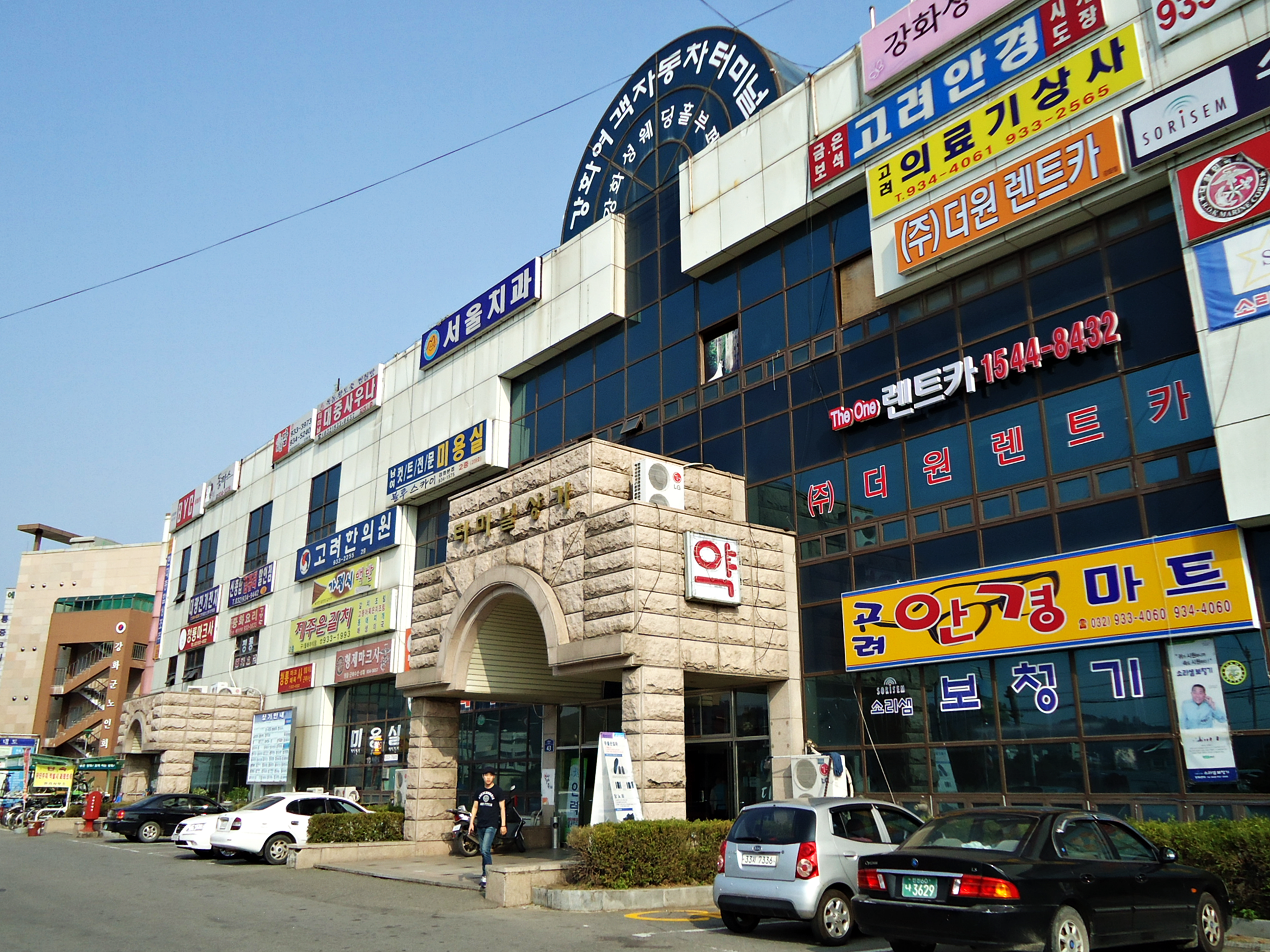 강화여객자동차터미널 건물 모습입니다.